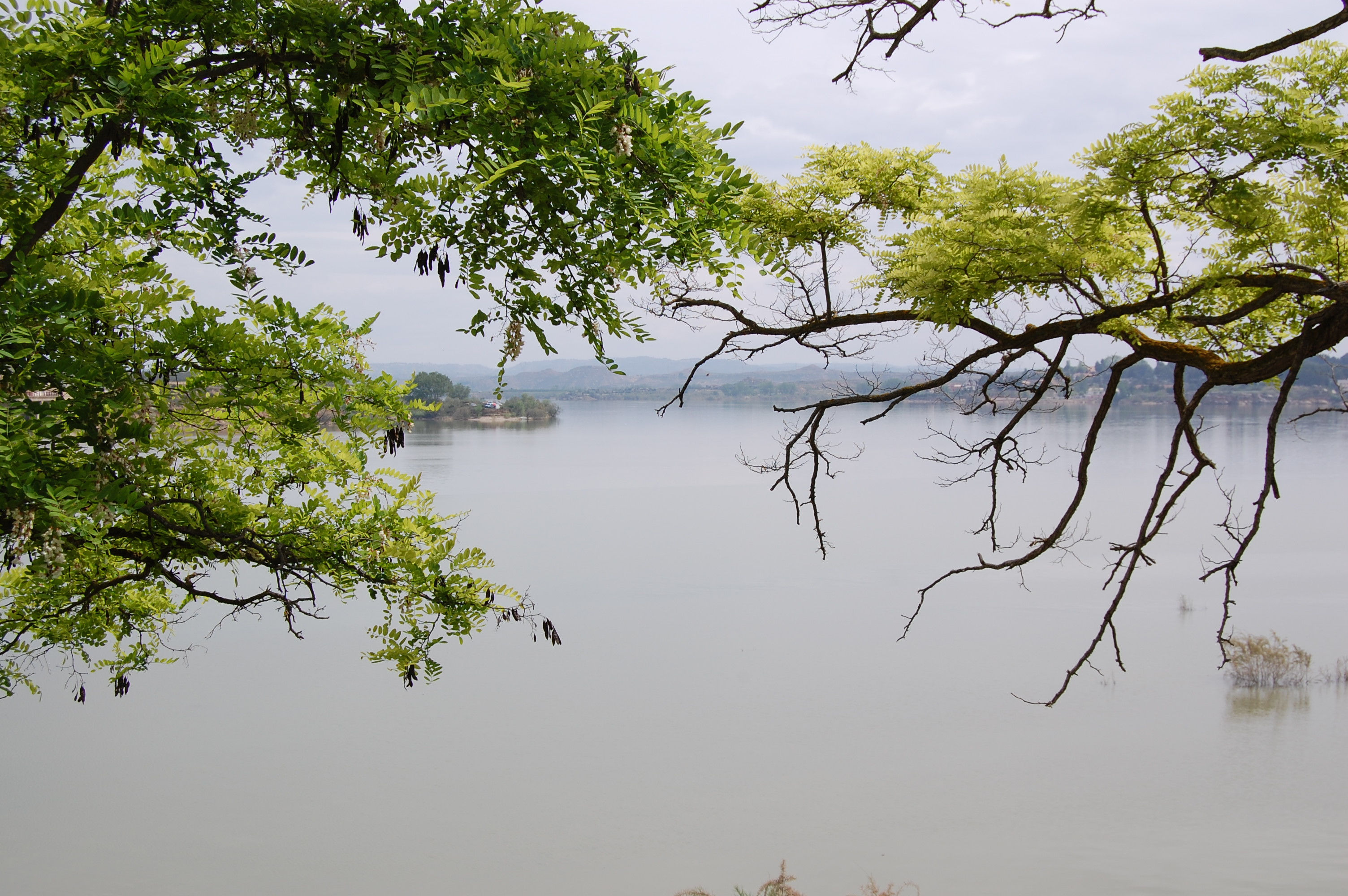 Mar de Aragón (Caspe, Zaragoza)